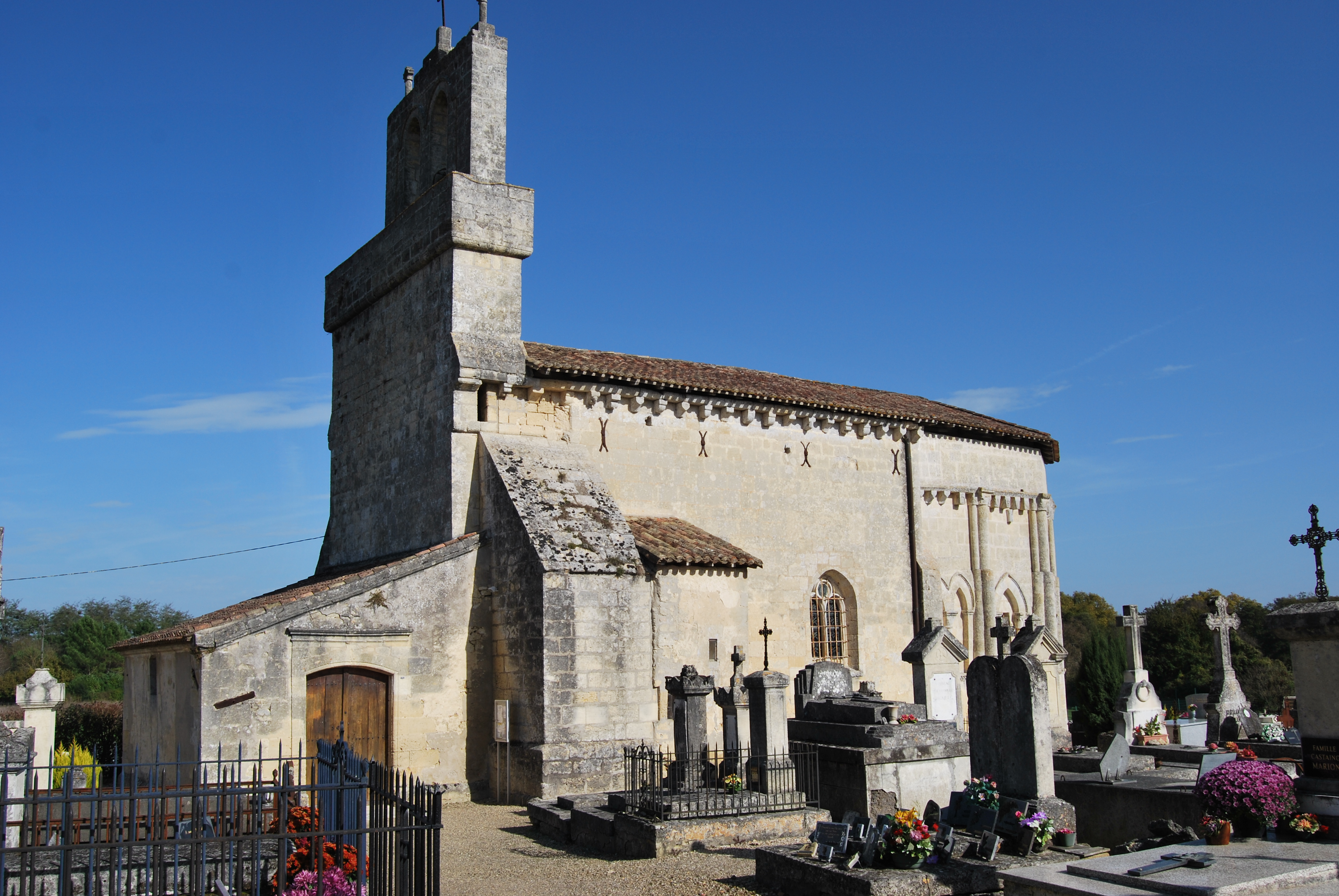 Camarsac Eglise St Saturnin